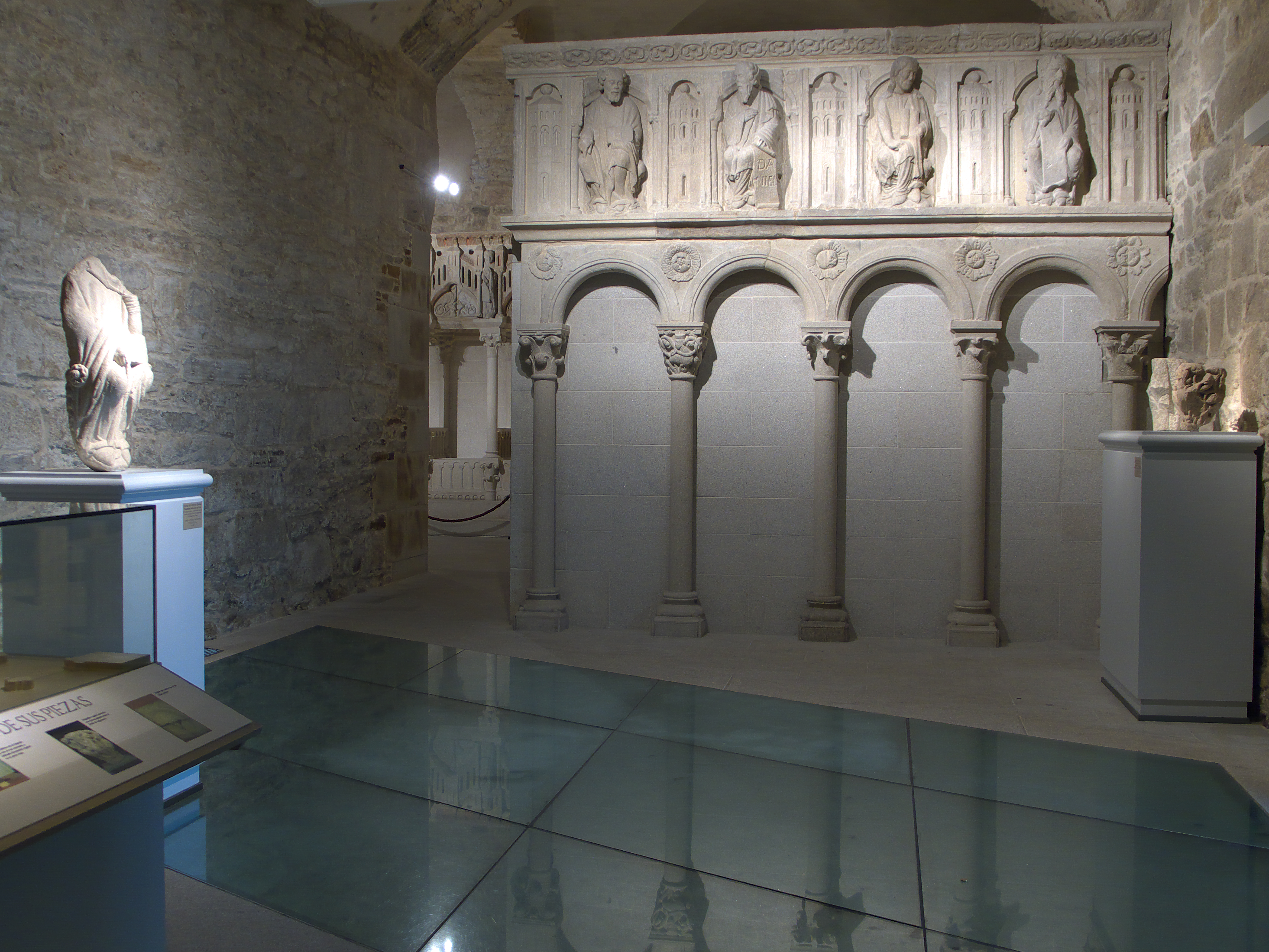 Museo de la Catedral. Reconstruído acertadamente por la Fundación Barrié (1999). Símbolo de la "Nueva Jerusalén que desciende del cielo", Apocalípsis de San Juan. En los años 1603-1604, el arzobispo Juan de Sanclemente y Torquemada decide suprimir el coro mateano.